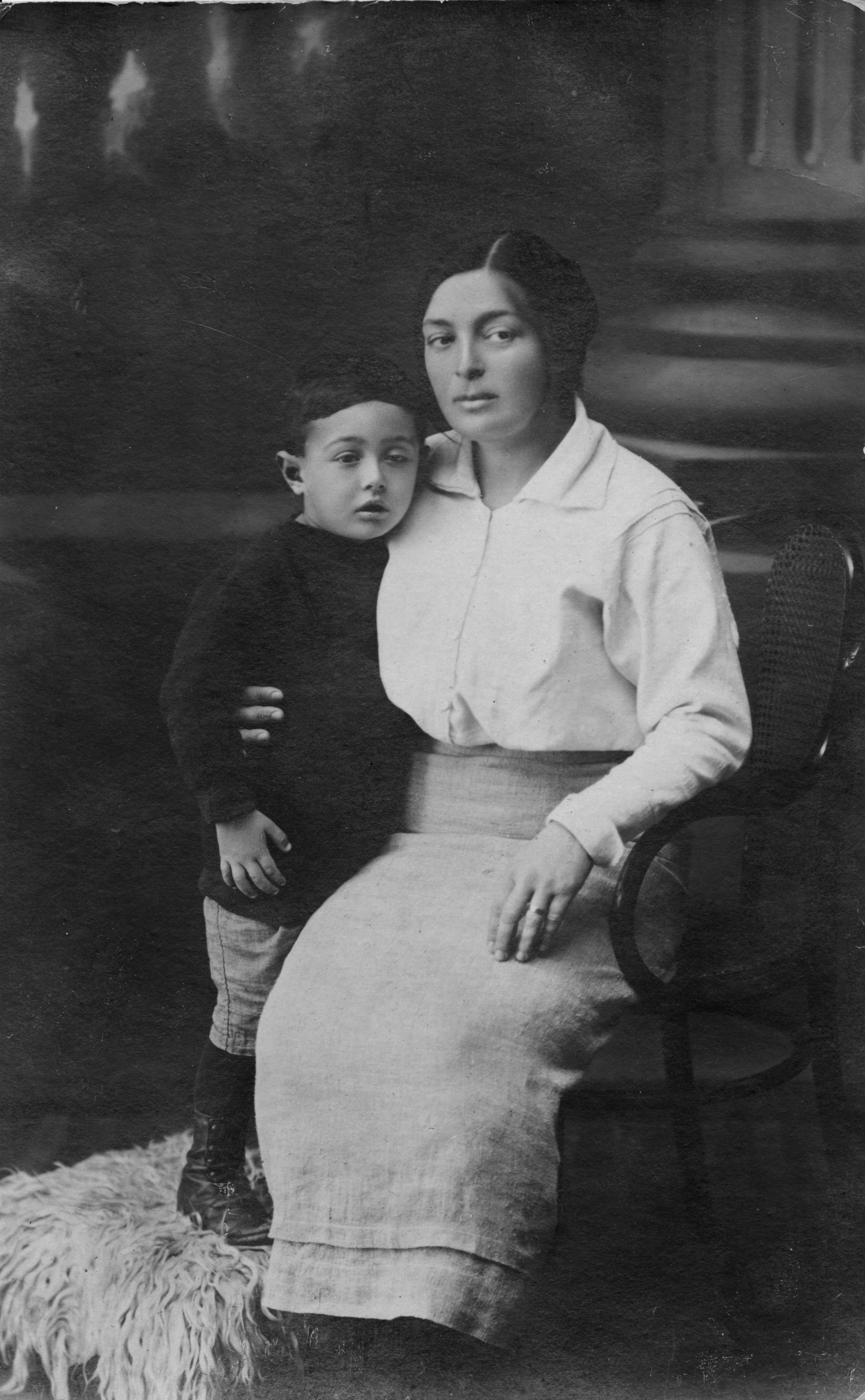 דבורה דייון הייתה חלוצה, אשת העלייה השנייה, ממייסדות קיבוץ דגניה א' ומושב נהלל בתמונה עם משה דיין